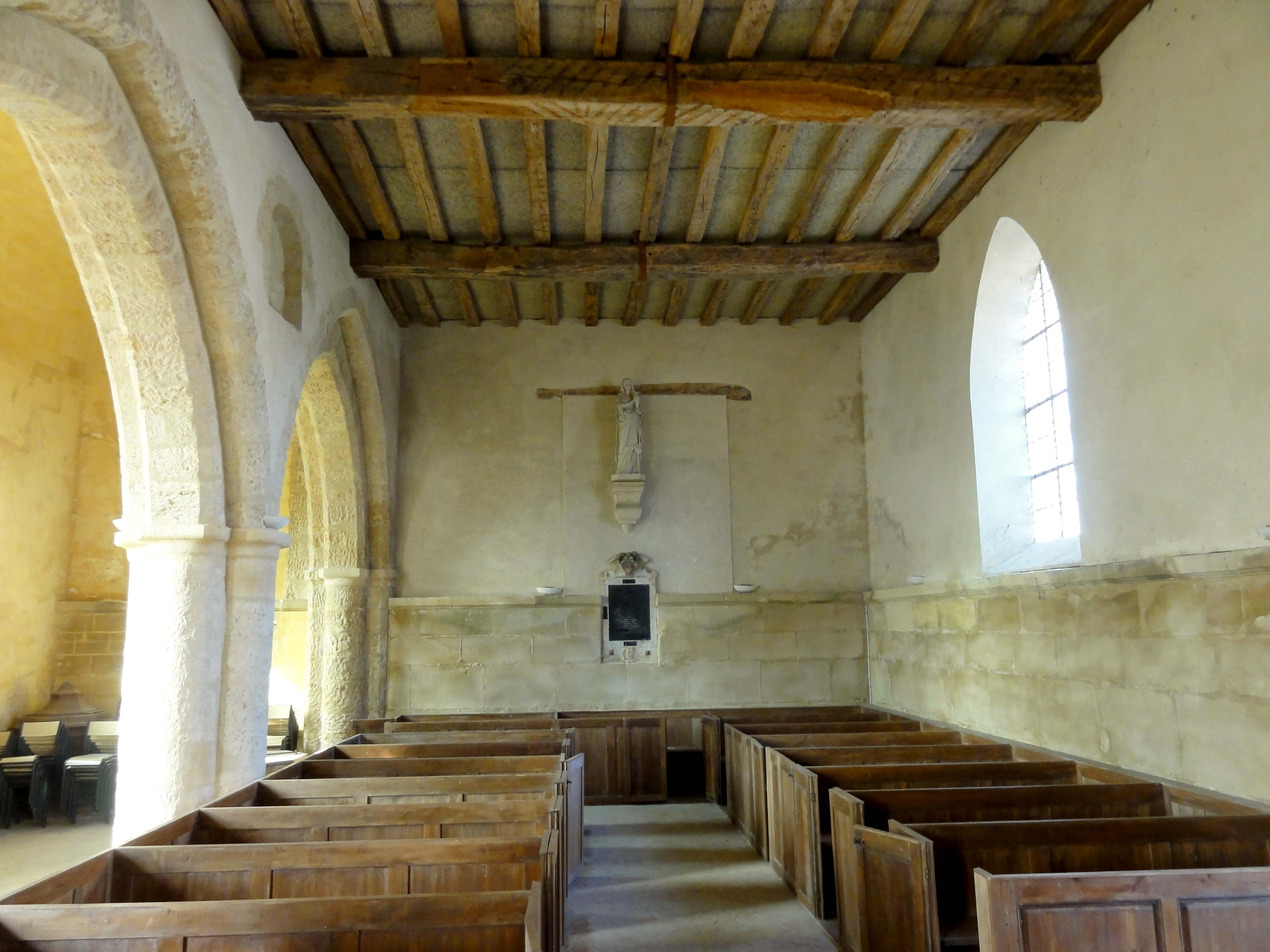 Intérieur de l'église - voir titre.